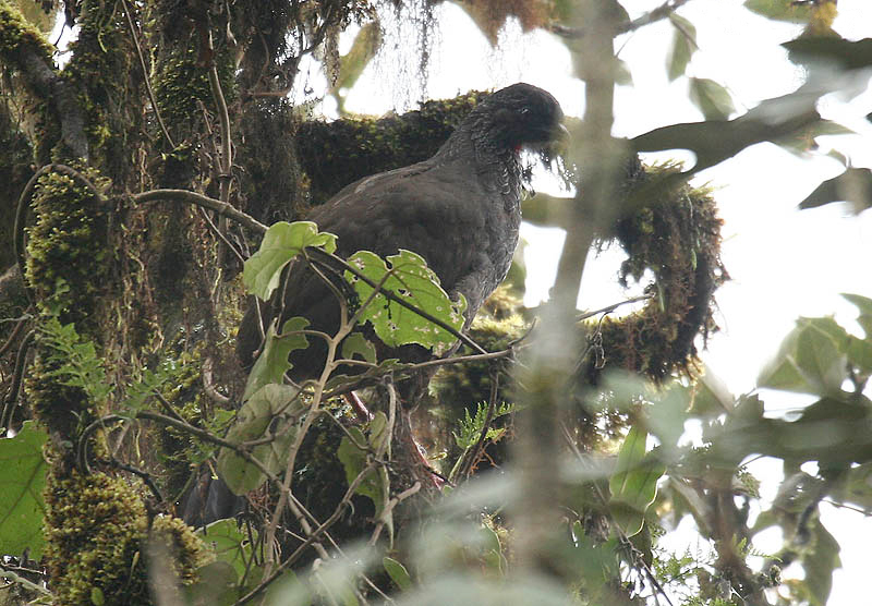 Andean Guan (Penelope montagnii). Yanacocha Reserve, Ecuador. 3/8/2007